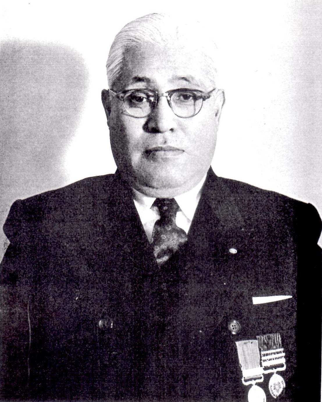 山一商店の後継として豊島株式会社を設立して社長を務めた四代目豊島半七（1900-1962）。一宮市名誉市民。